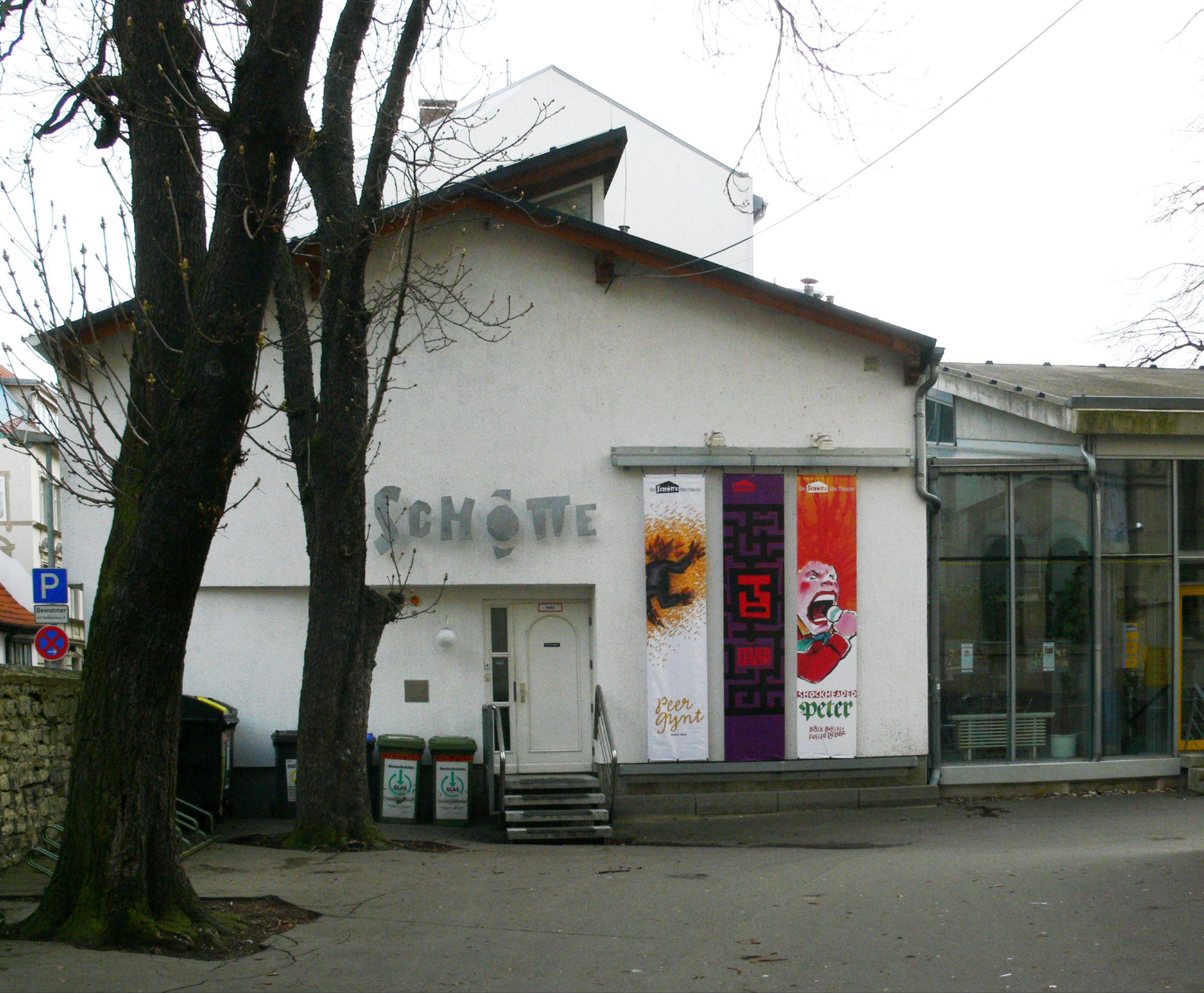 Erfurt, "Theater Die Schotte", Schottenstraße (Seitenstraße der Johannesstraße)